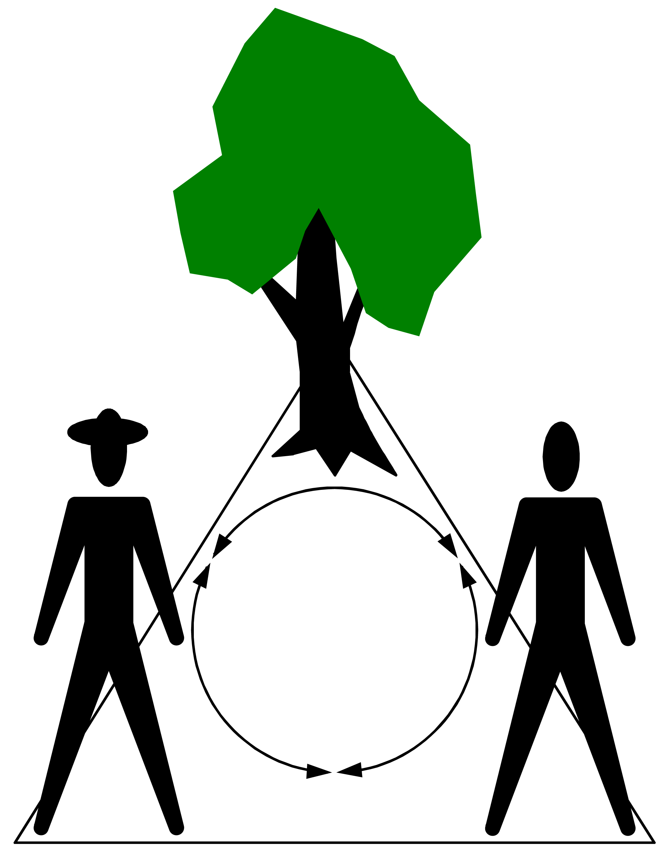 Interpretationsdreieck